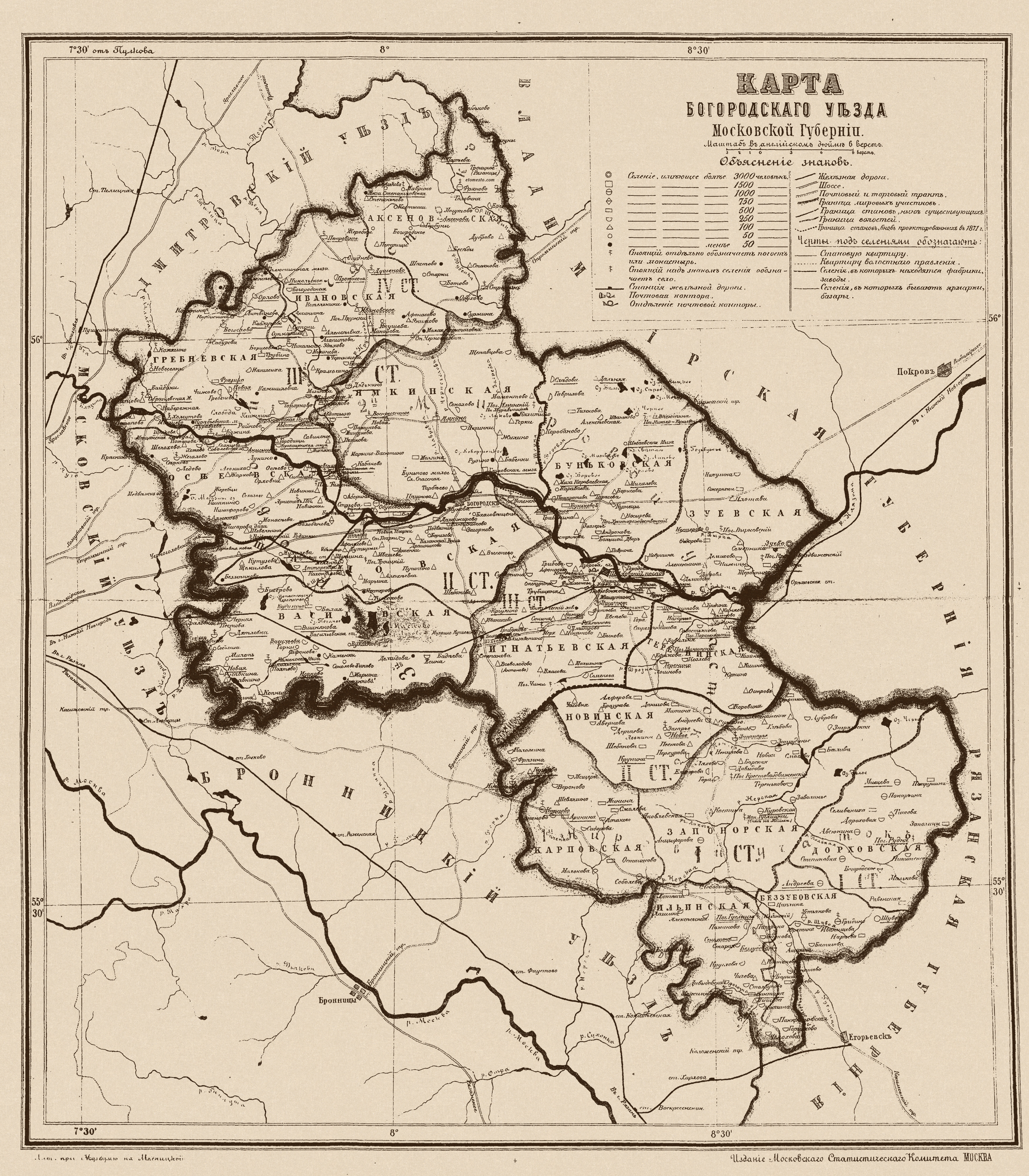 Карта Богородского уезда Московской губернии 1873 года. Московский статистический комитет.